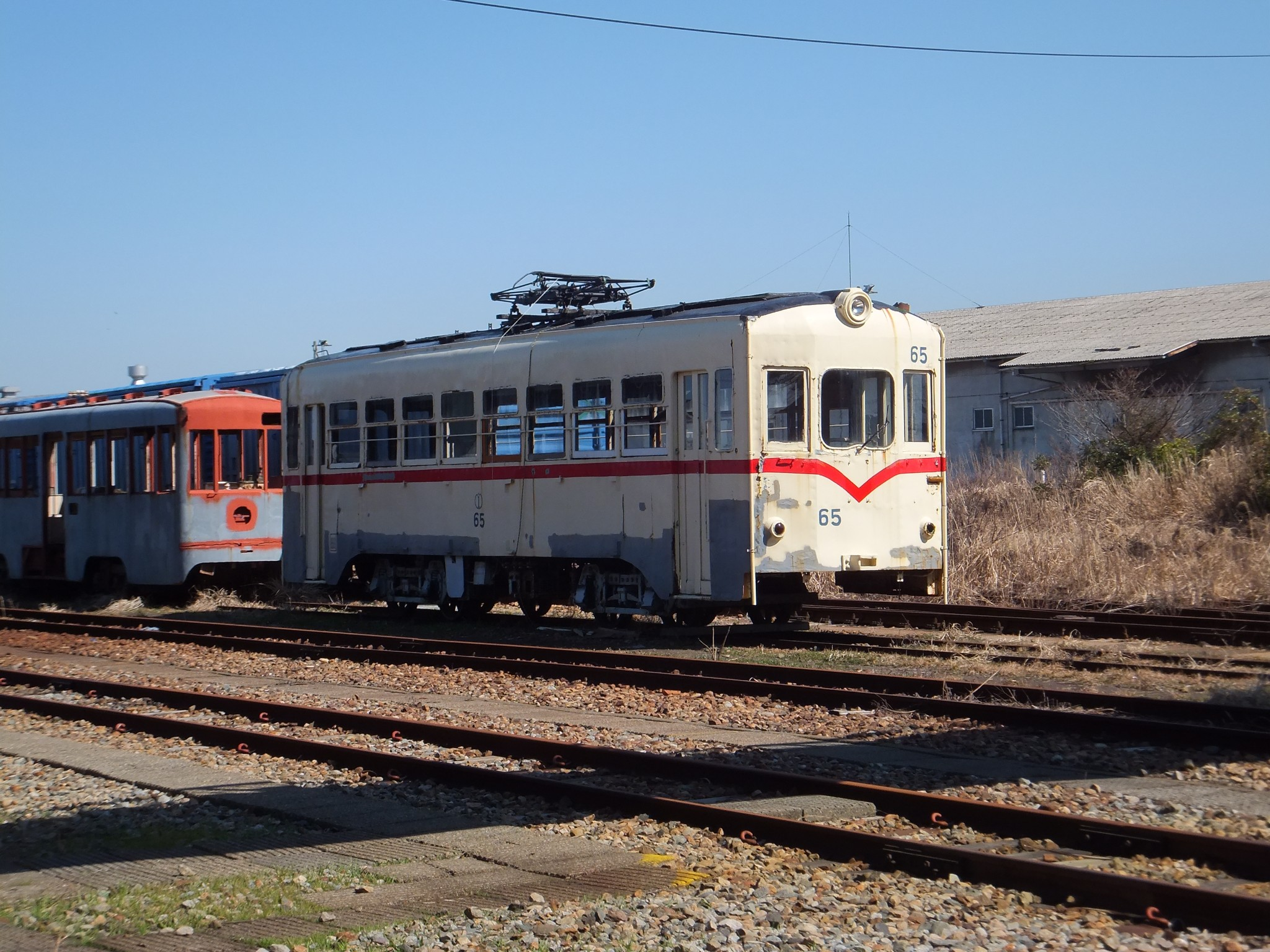 Fushikinishikimachi, Takaoka, Toyama Prefecture 933-0105, Japan